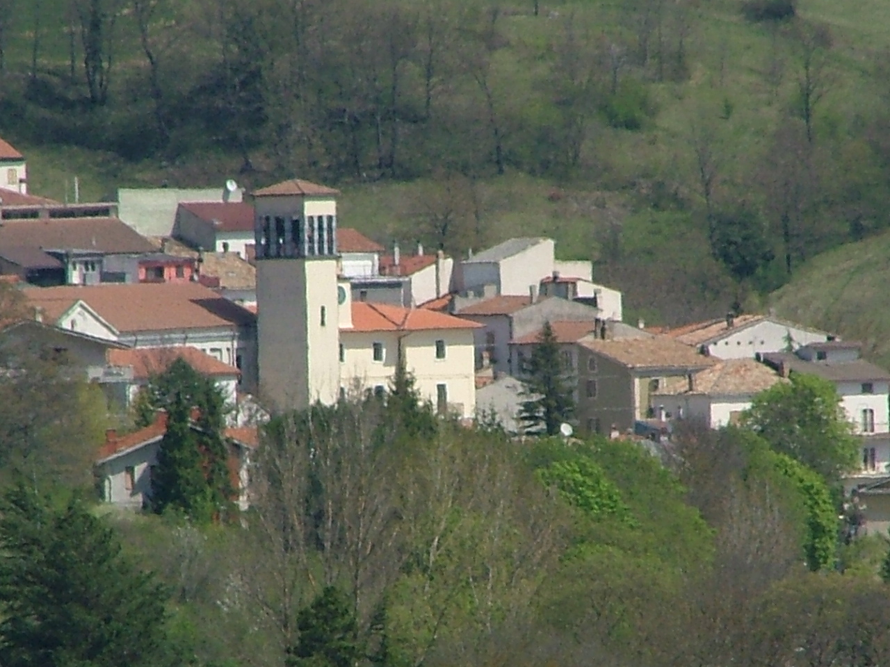 Autore: Eleonora Scorcio di Ateleta